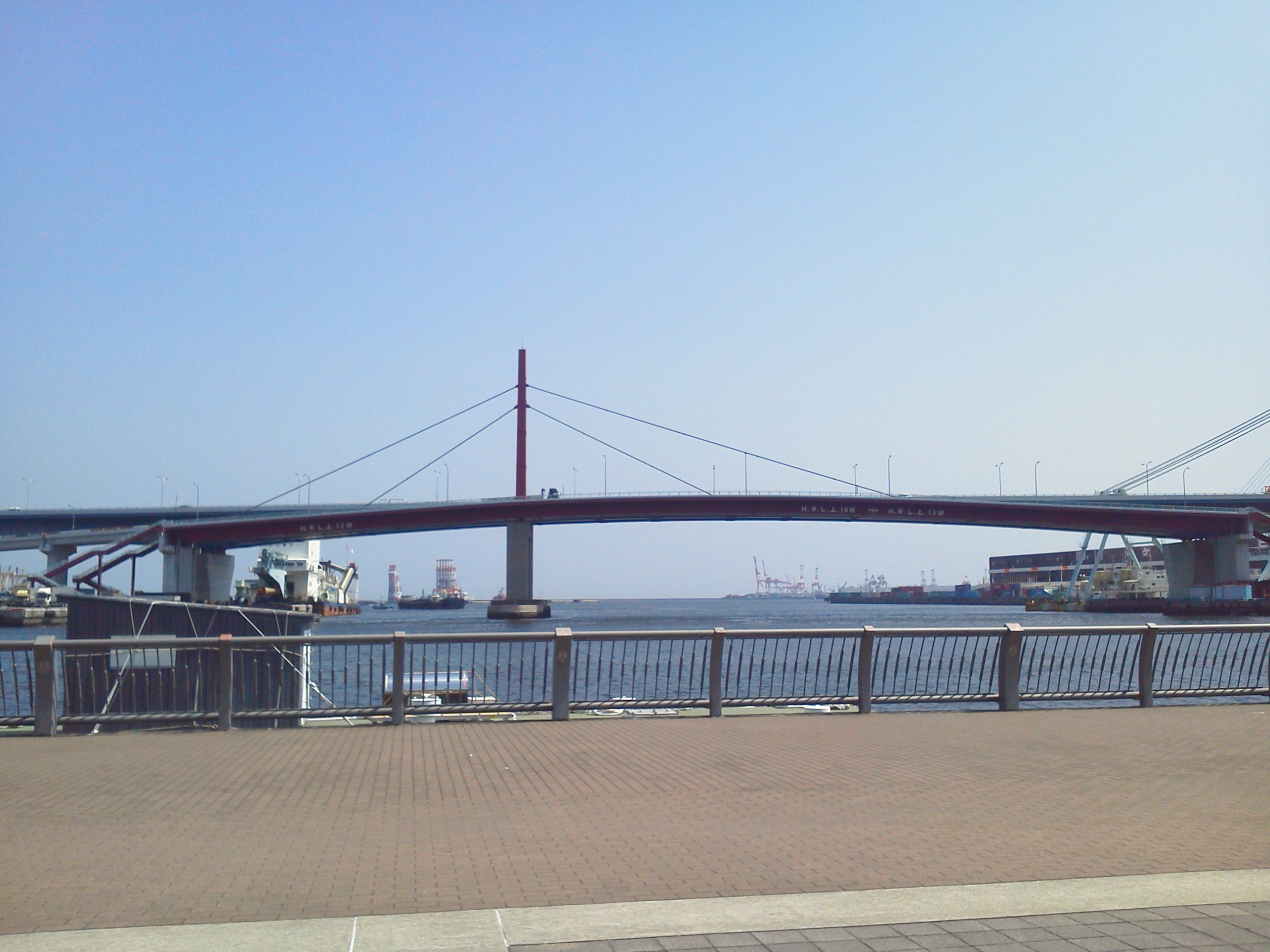 摩耶大橋を北側から撮影したもの